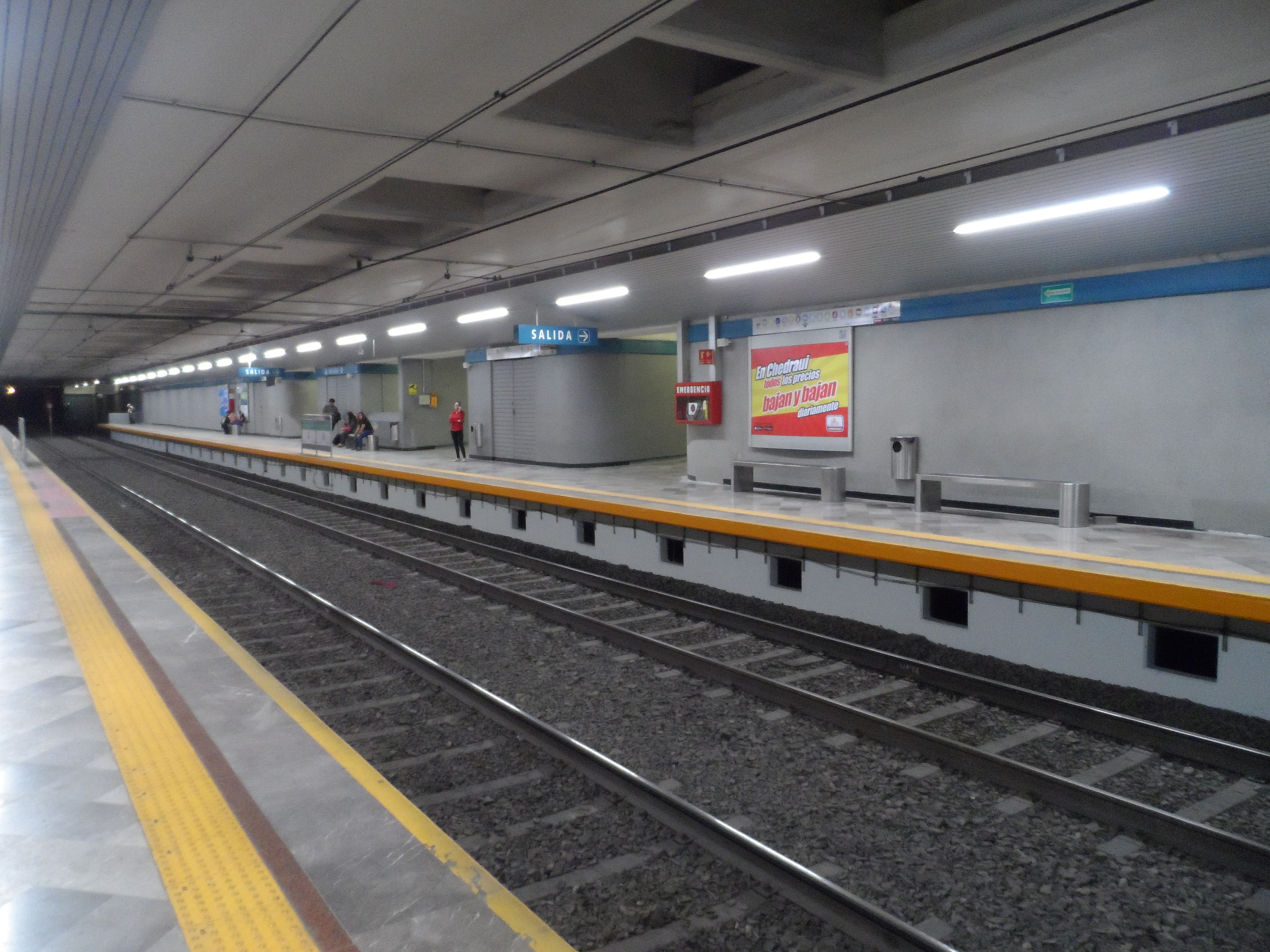 Andenes de la estación "Refugio" de la Línea 1 del Tren Ligero de Guadalajara.